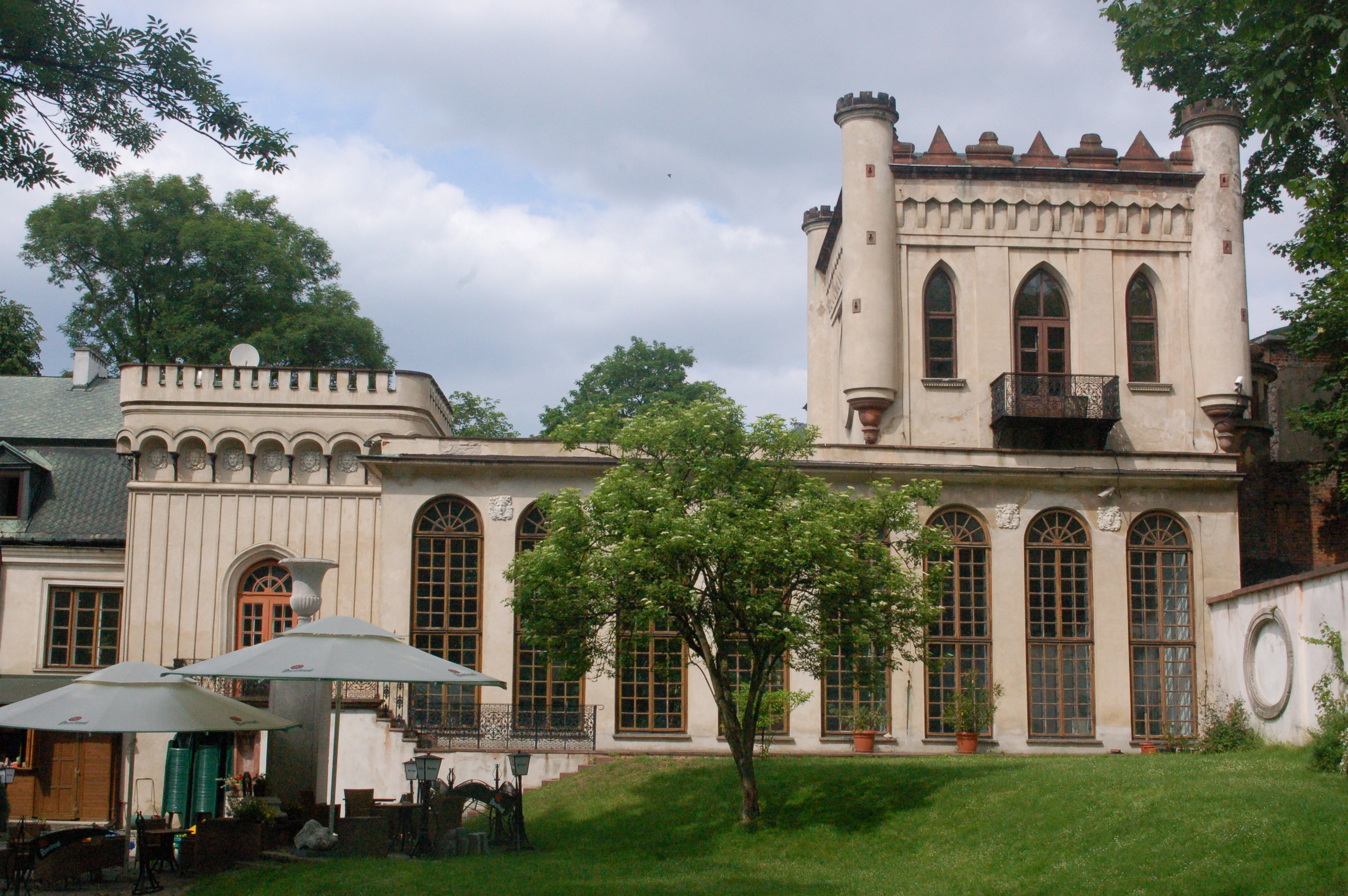 Zielinksi Palast in Kielce